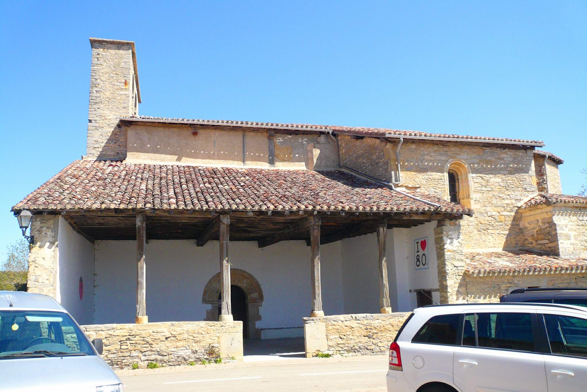 Iglesia de San Juan Evangelista (Guereña, Vitoria, Álava)